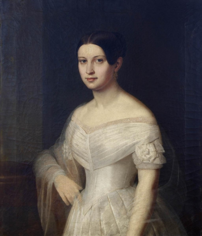 Надежда Александровна Дубовицкая (1817 – 1893), дочь А. П. Дубовицкого, художница-любительница.